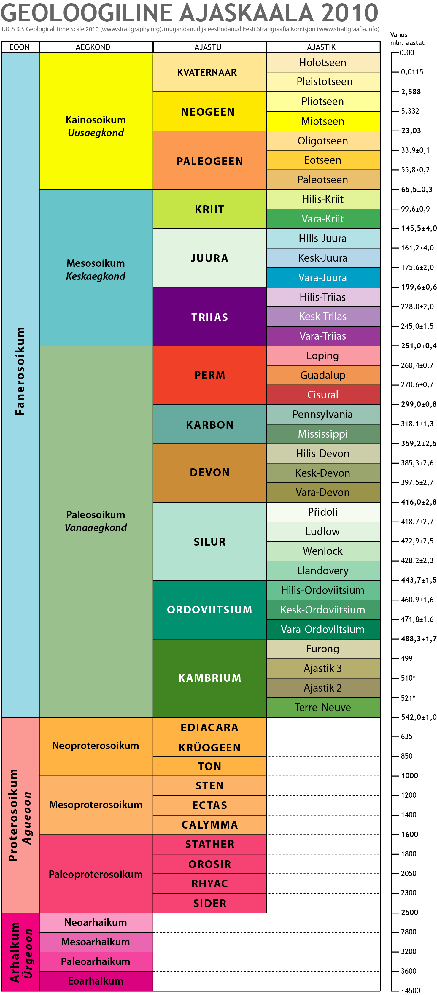 Globaalne geoloogiline ajaskaala